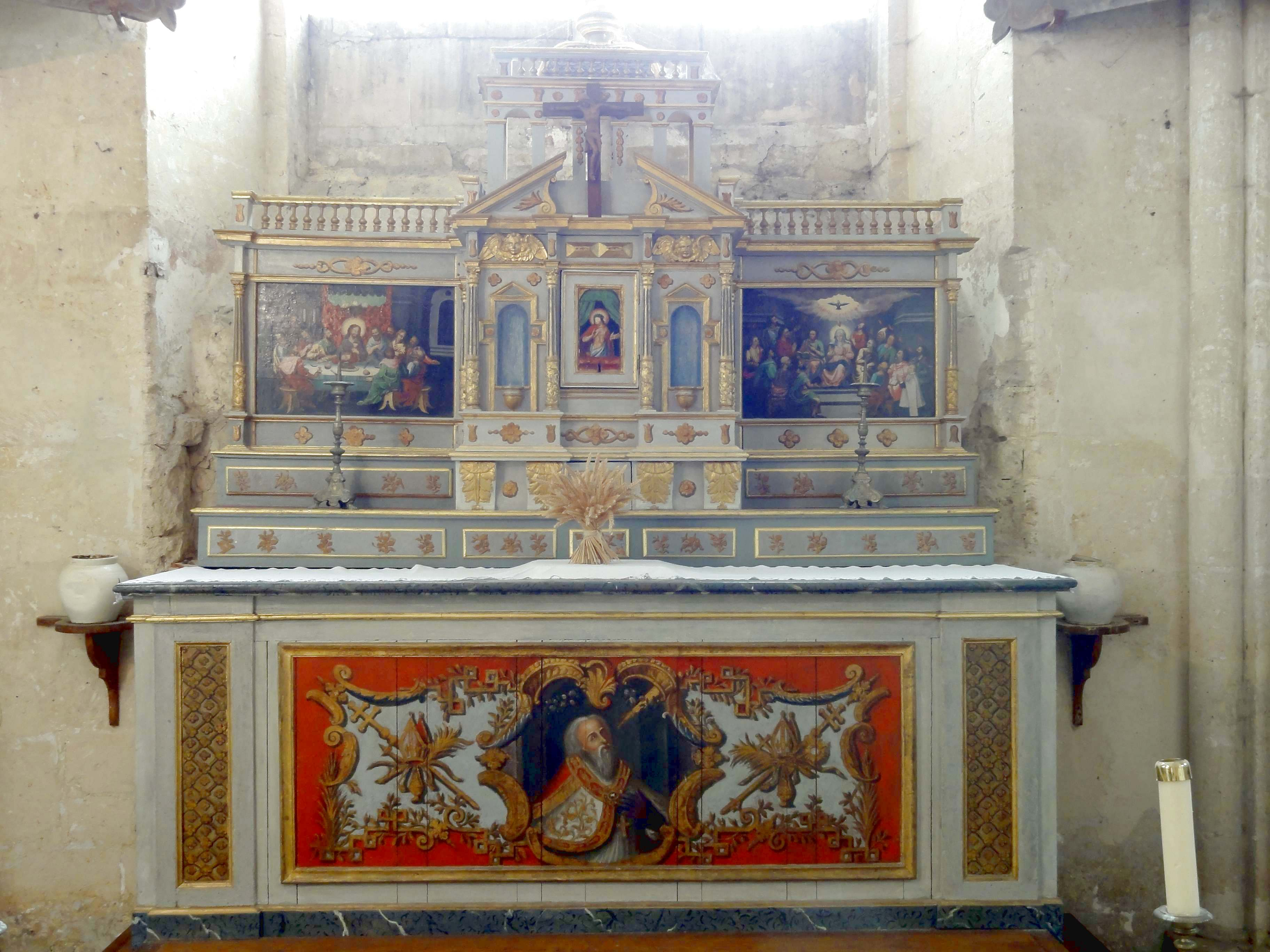 Mobilier de l'église Saint-Sulpice de Béthancourt-en-Valois - voir titre.